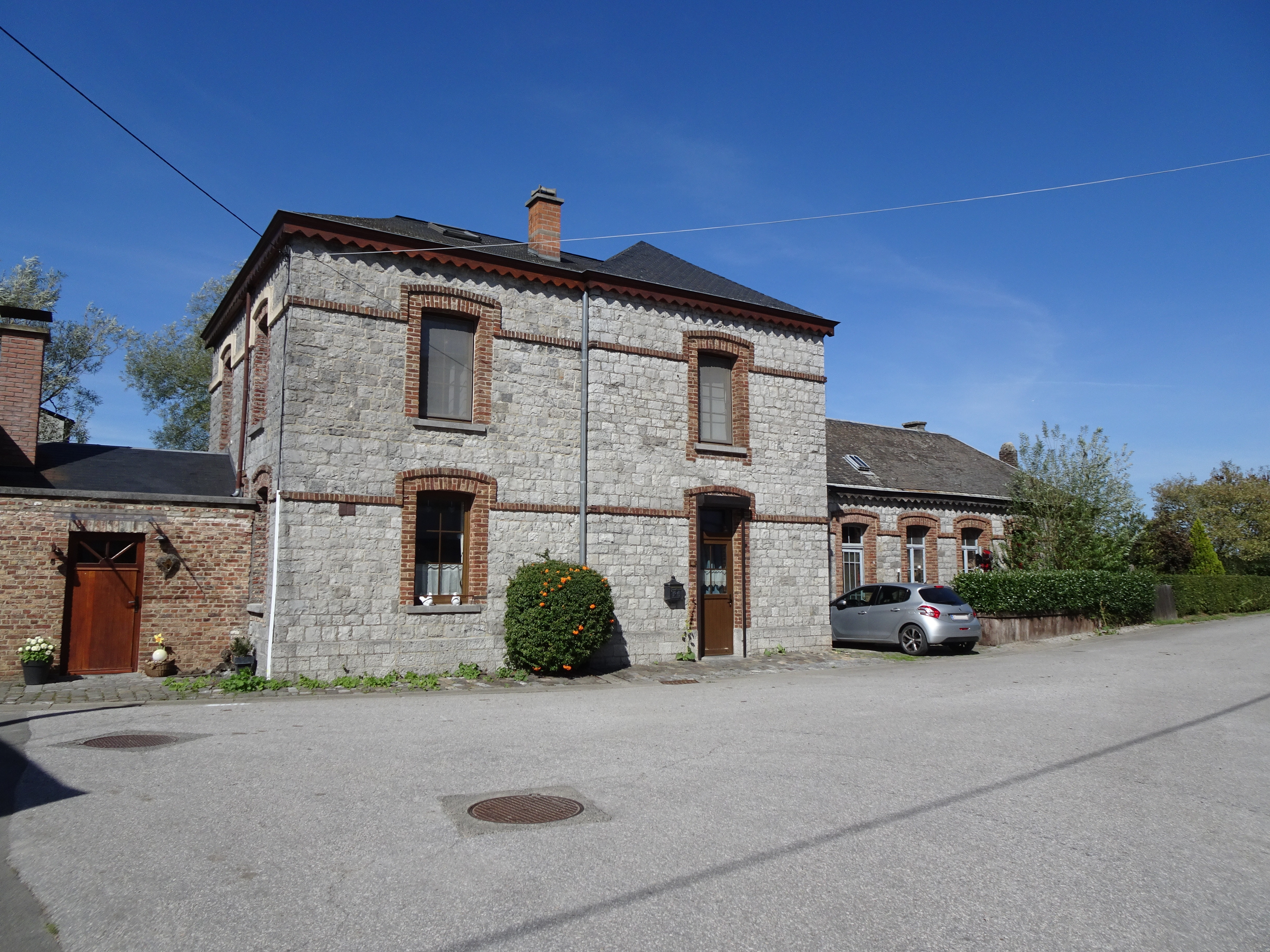 gare d'Éprave le long du Ravel